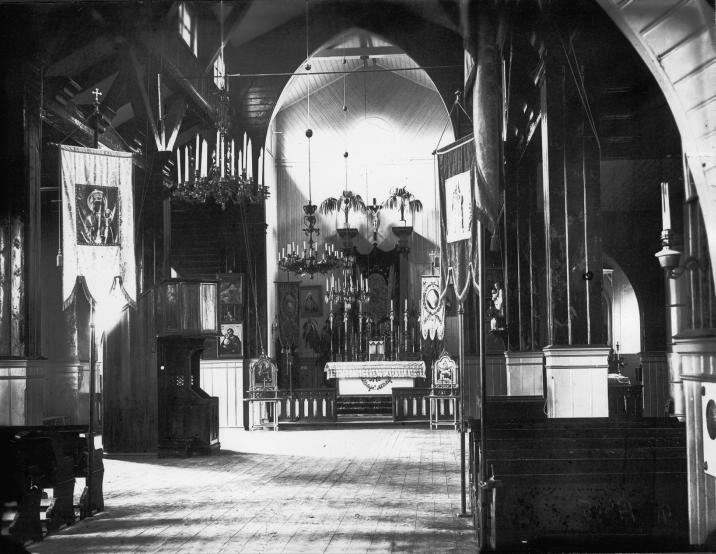 интерьер